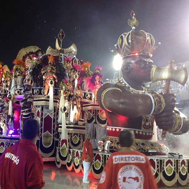 GRES Unidos de Padre Miguel 2013. Foto: Sebástian Freire